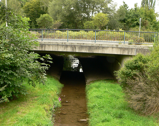 Swist in Meckenheim